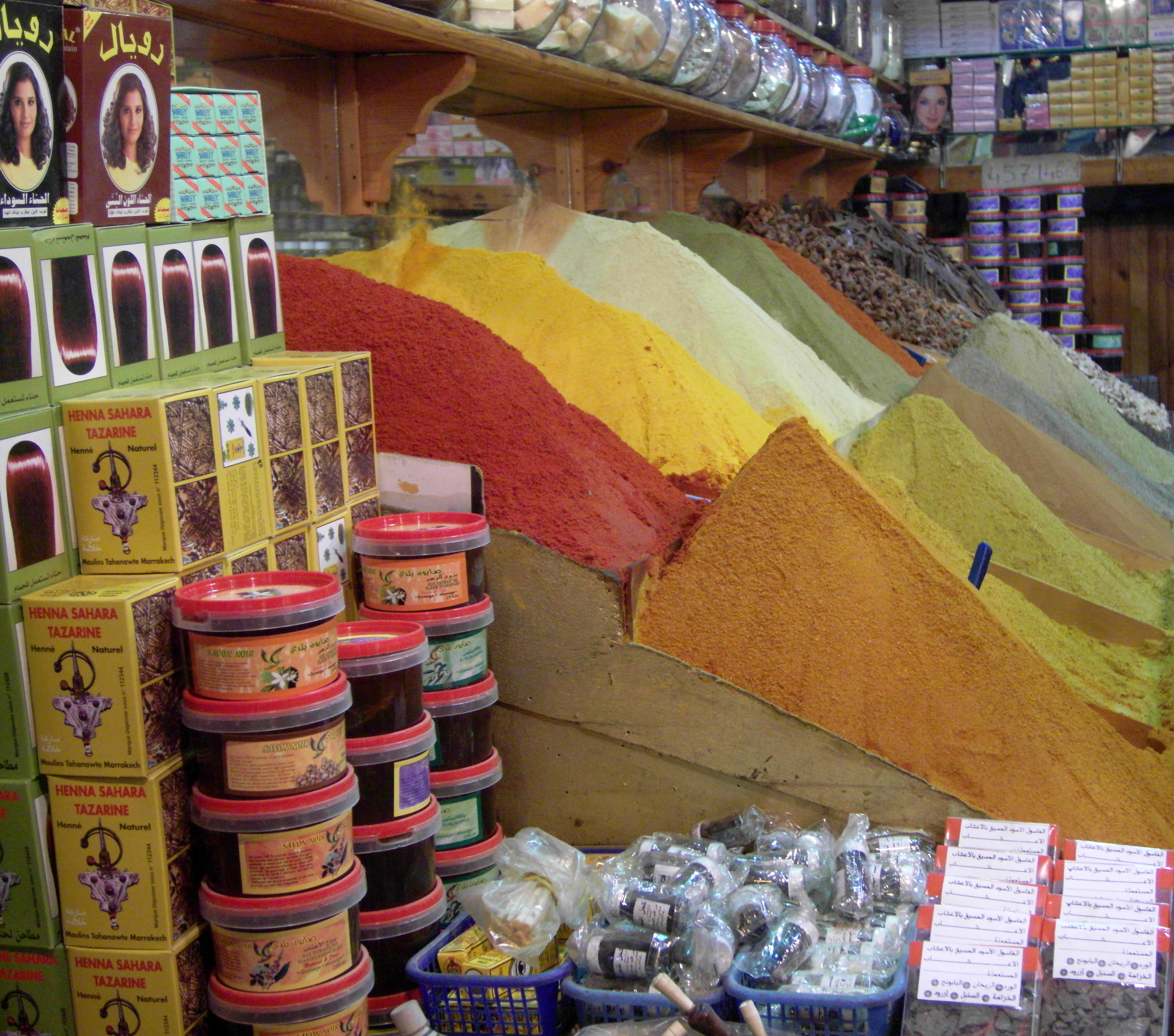 Un étal d'épices à Marrakech